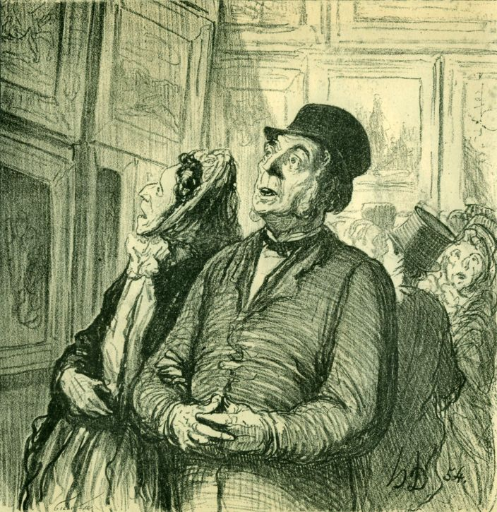 Dimanche au musee